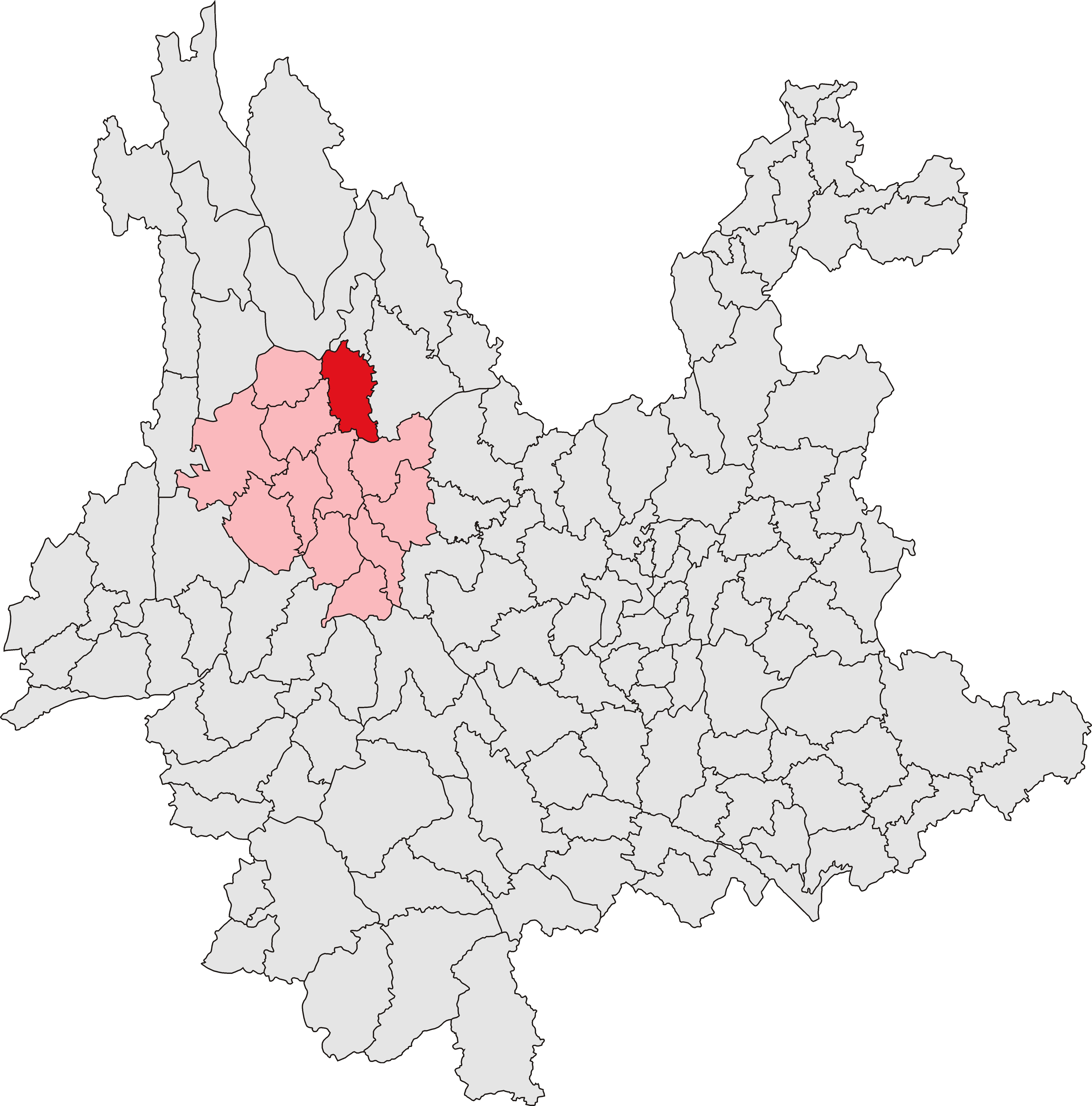 中文（中国大陆）: 鹤庆县位置图